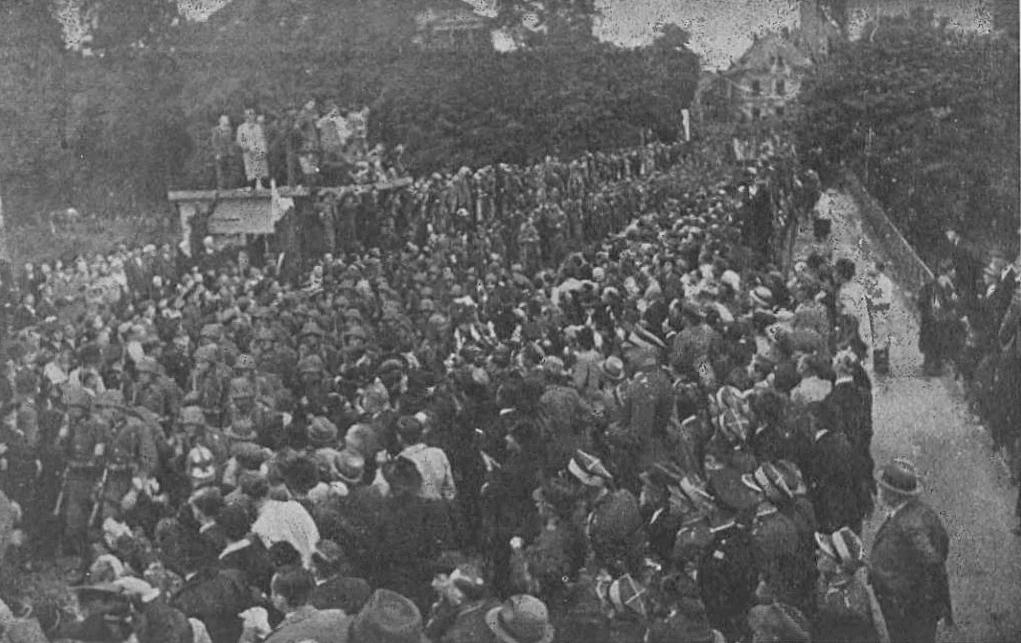 Wojsko Polskie przekracza czeską granicę 2 października 1938